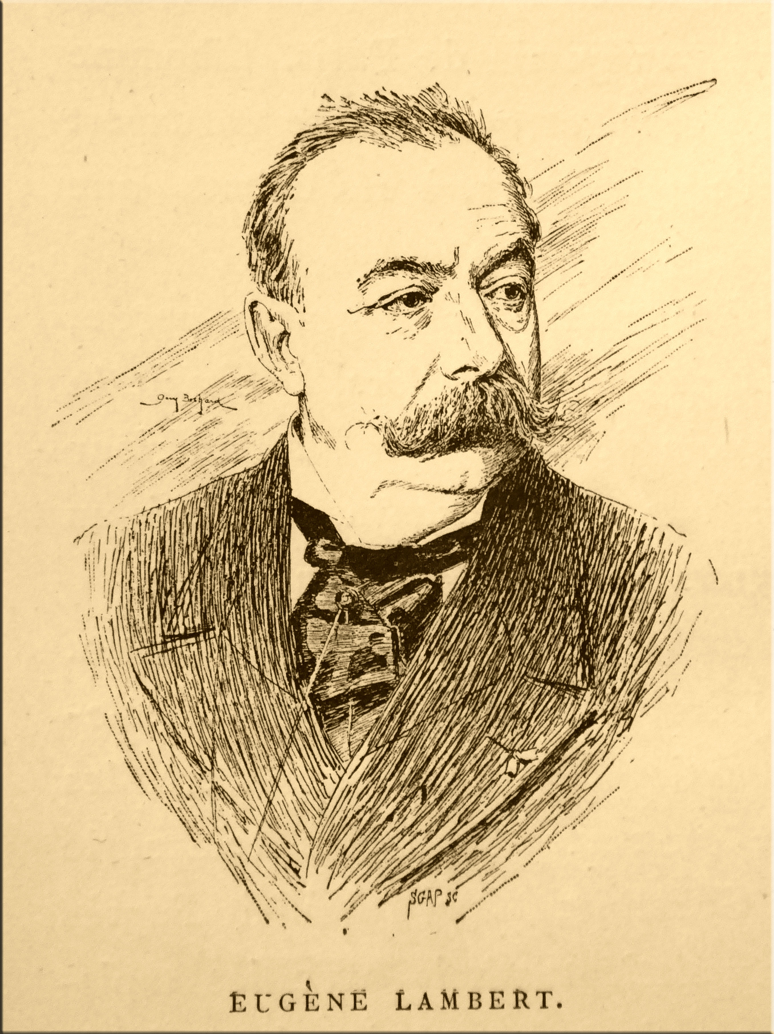 Bildnis des Louis Eugène Lambert